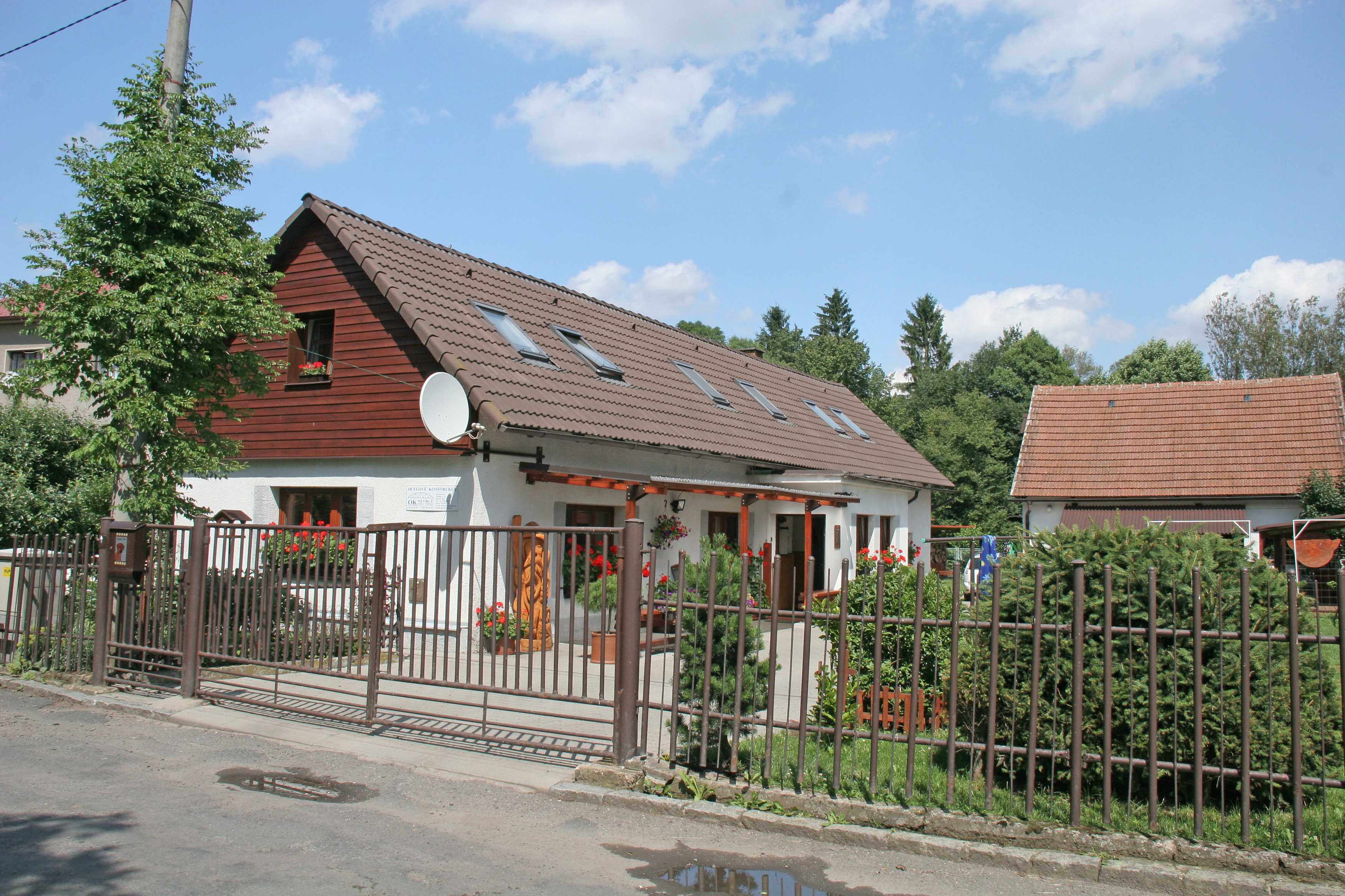 Počátky u Seče čp. 57